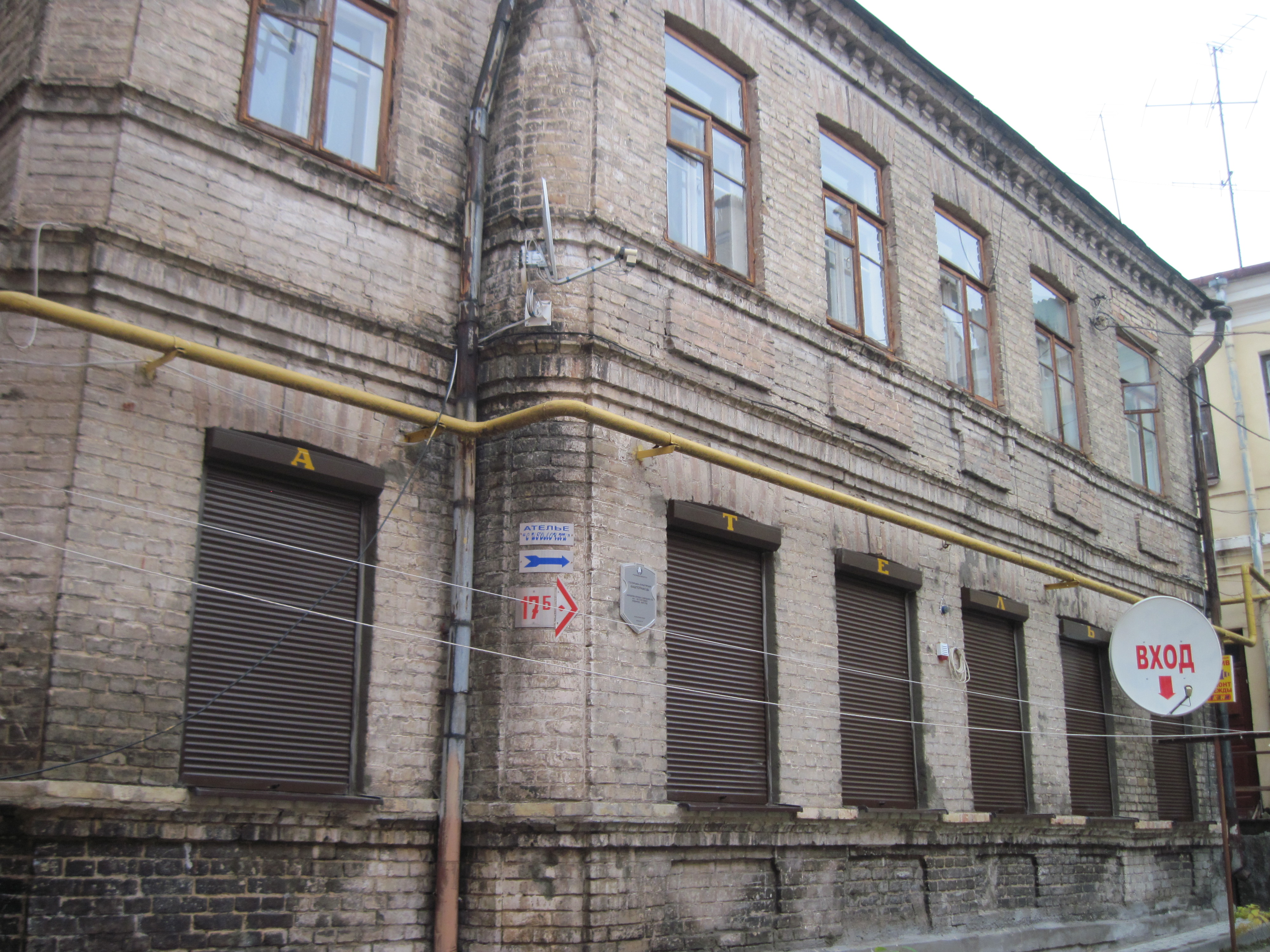 Беларуская (тарашкевіца): Будынак №17б, вул. Савецкая, Гродна